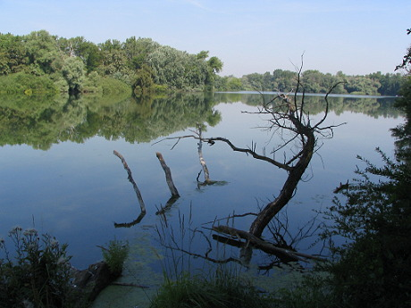 Altrhein Maxau, Teil des Knielinger Sees